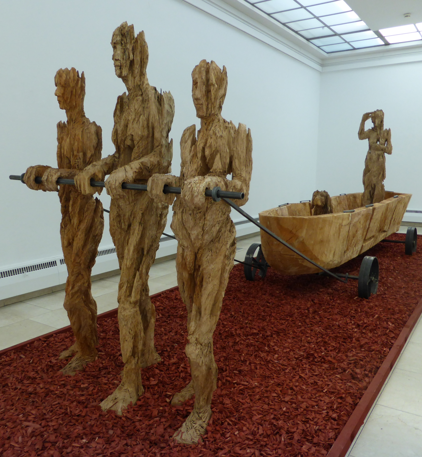 Skulptureninstallation, Städtische Galerie Rosenheim